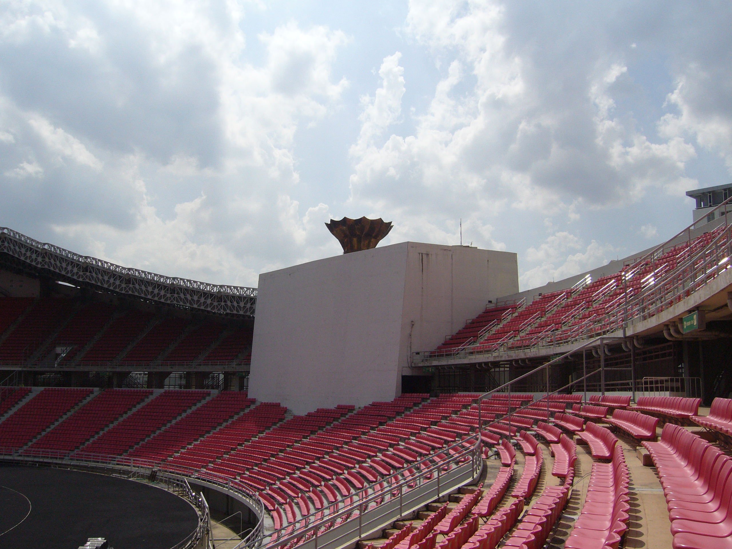 Rajamangala Stadium